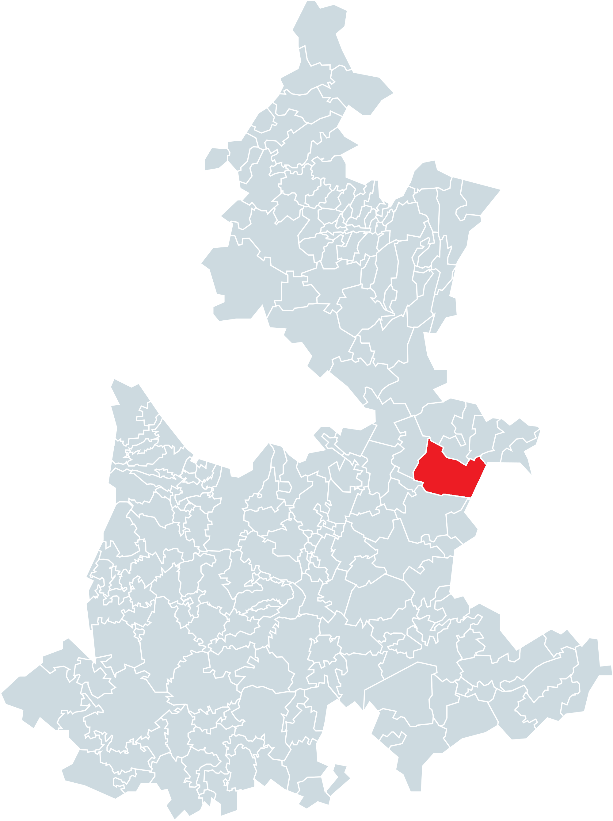 Municipio de Tlachichuca